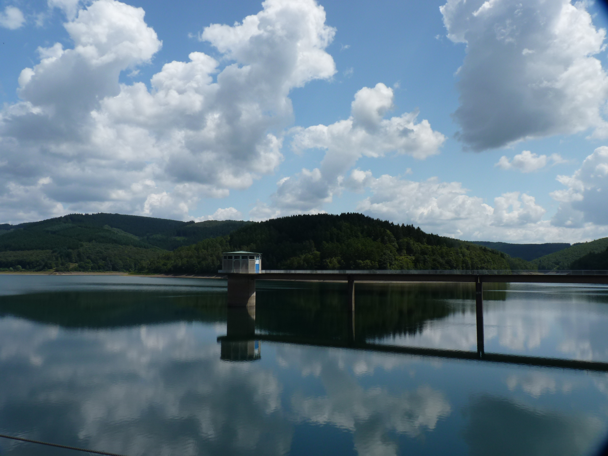 Die Obernautalsperre im Sommer 2014, im Vordergrund ist der Entnahmeturm zu sehen